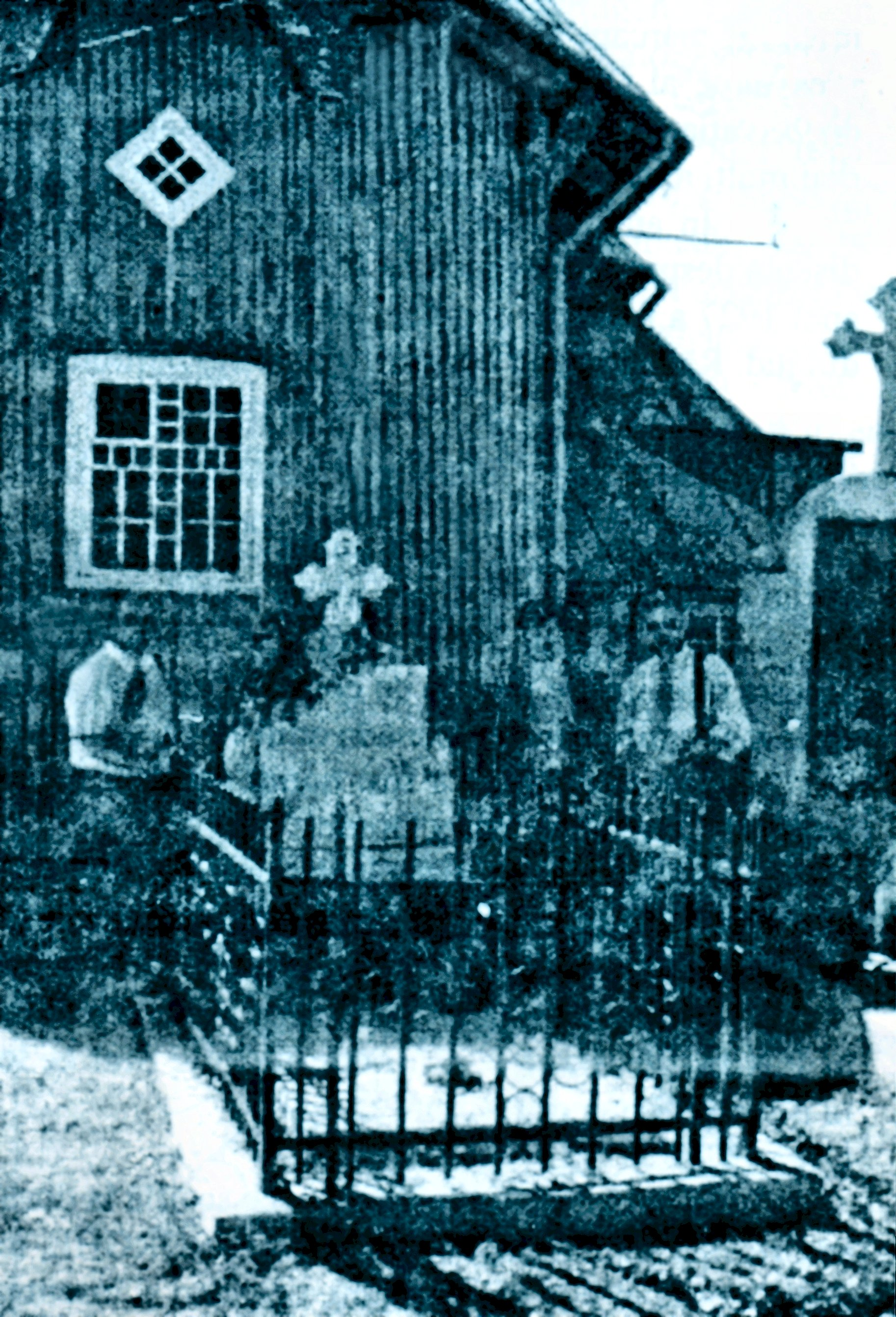 Grab des Iancu Ritter von Flondor in Storojineţ